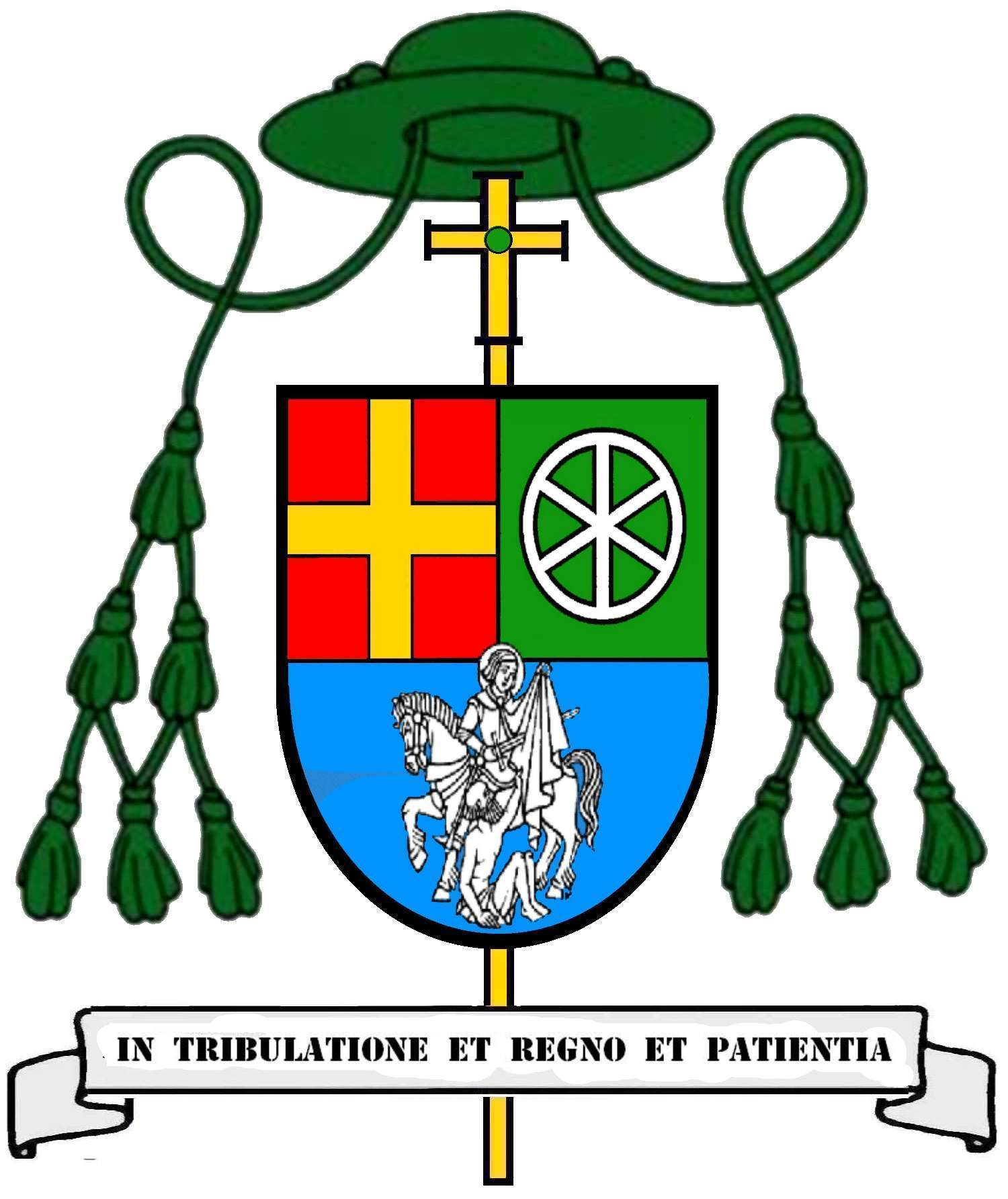 Wappen Hugo Aufderbeck (1909-1981), Weihbischof in Fulda mit Sitz in Erfurt 1962-1973, Apostolischer Adminitrator im Bischöflichen Amt Erfurt-Meiningen 1973-1981